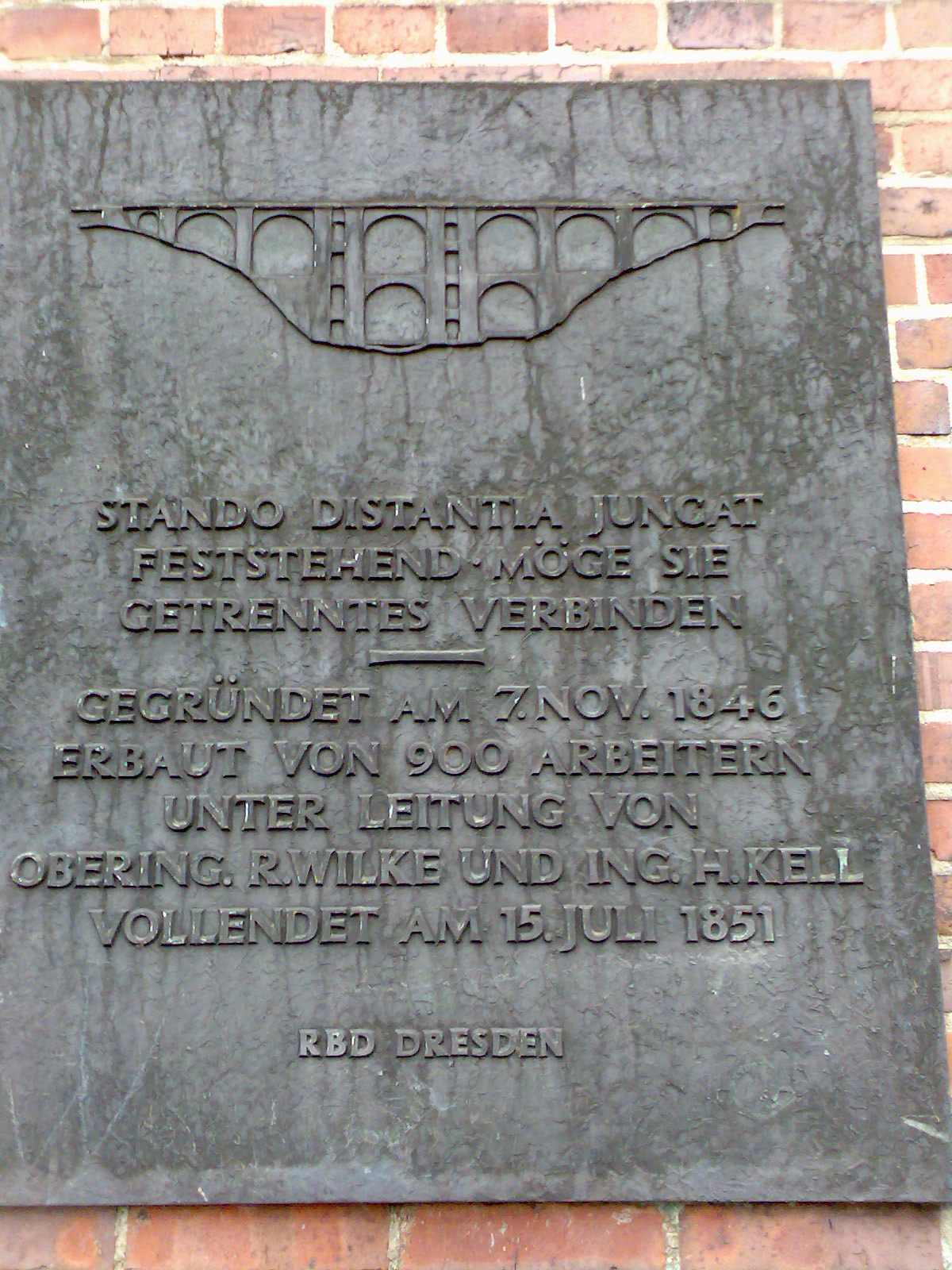 Dies ist eine der zwei an der Elstertalbrücke angebrachten Tafeln.